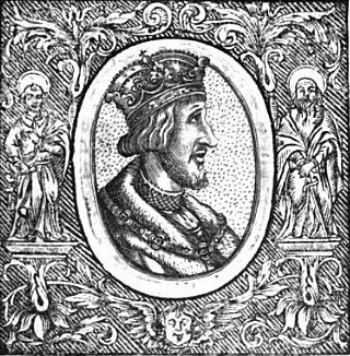 Vladislav jagellonský